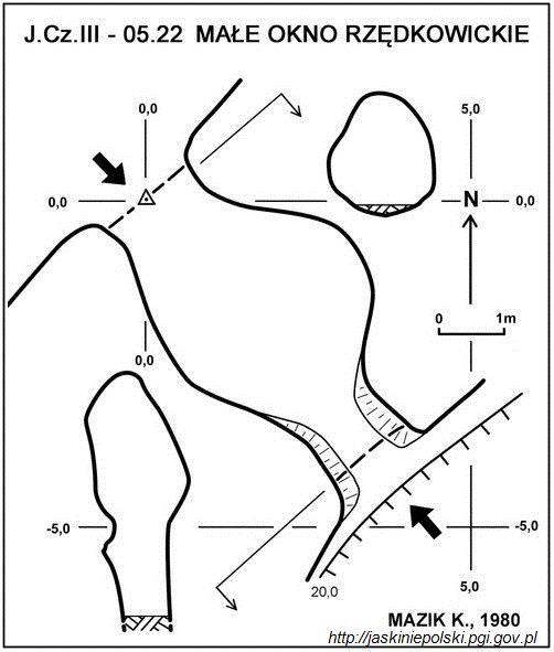 Małe Okno Rzędkowickie - plan